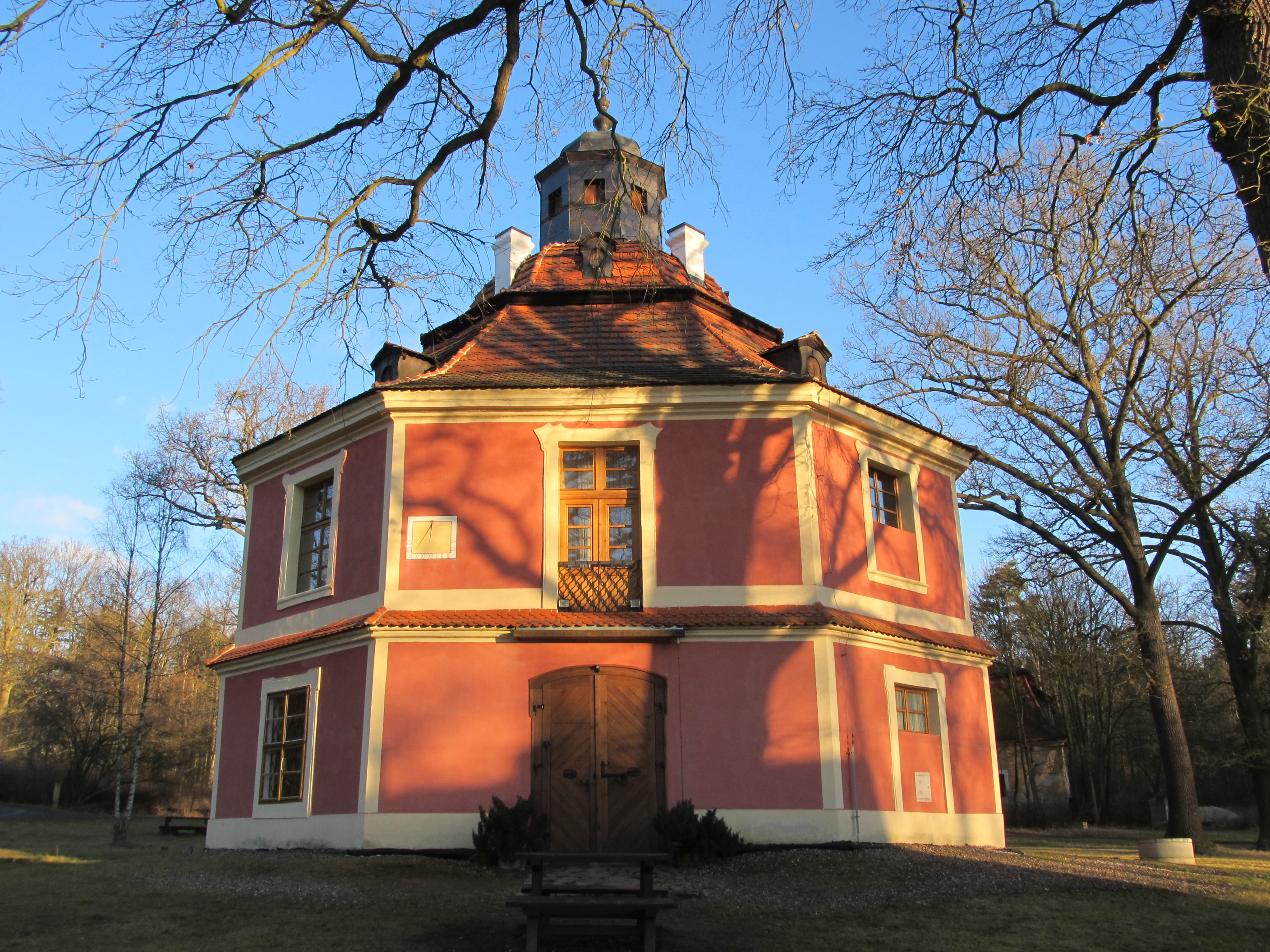 Svatý Hubert - lovecký zámeček